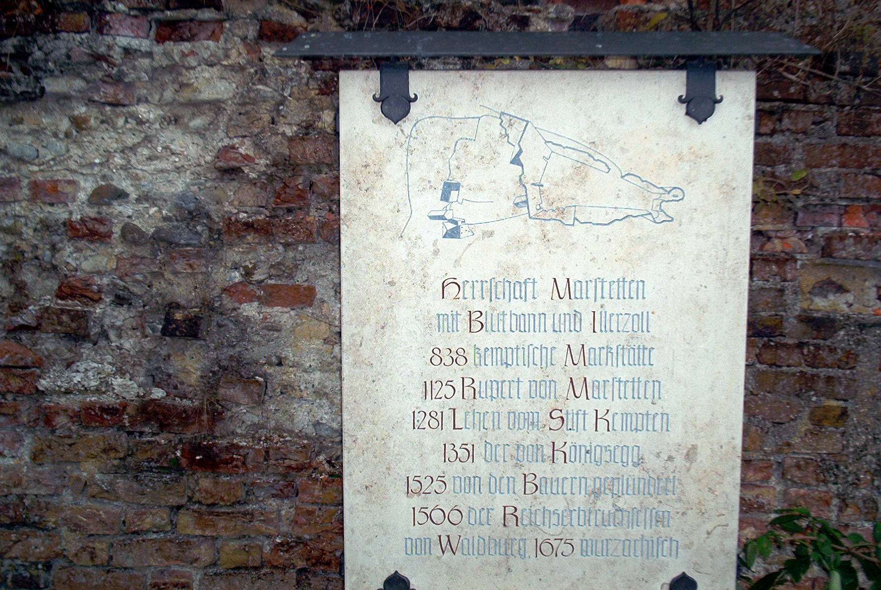 Infotafel in der Burgruine Marstetten.